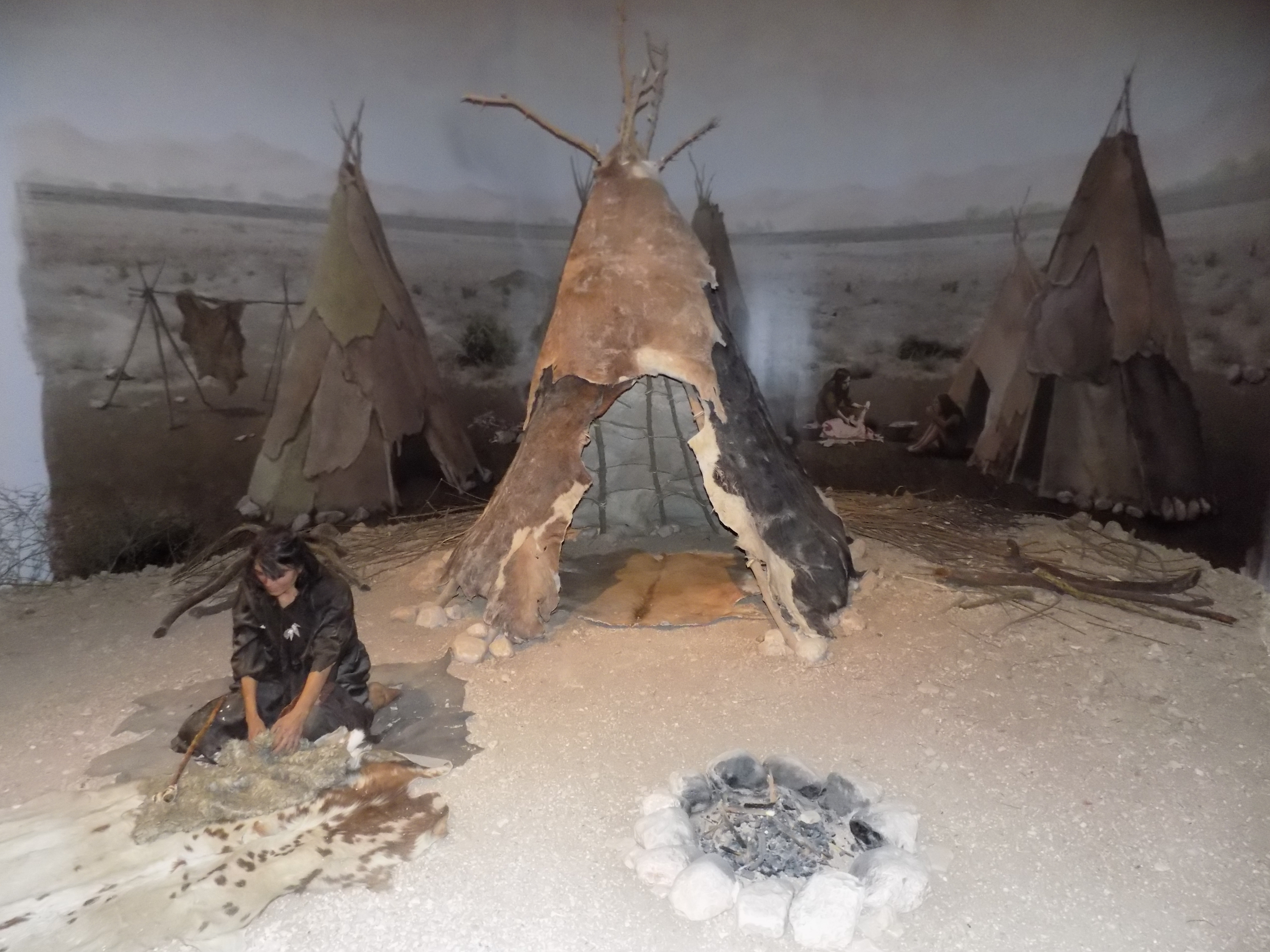 Paleolitik Çağ boyunca beslenmek için topladıkları bitkilere ve avladıkları hayvanlara bağlı göçebe bir yaşam sürdüren insanoğlu mağara ve kaya altı sığınaklarının olmadığı yerlerde doğada hazır olarak bulunan ağaç, taş, kemik gibi hafif malzemelerden açık hava geçici barınak yapmışlardır. Üstlerini hayvan postları, çalı çırpı ve ağaç dallarıyla örterek oluşturdukları bu basit yalnızca barınma işlevi taşıyan tek mekanlı yapılardır. Neolitik Çağ ile birlikte kalıcı barınaklar, çok mekanlı ve işlevli konutlar ortaya çıkmıştır.